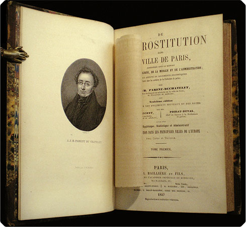 Frontispice de La prostitution dans la ville de Paris de , avec un portrait de l'auteur, 3e édition, 1857